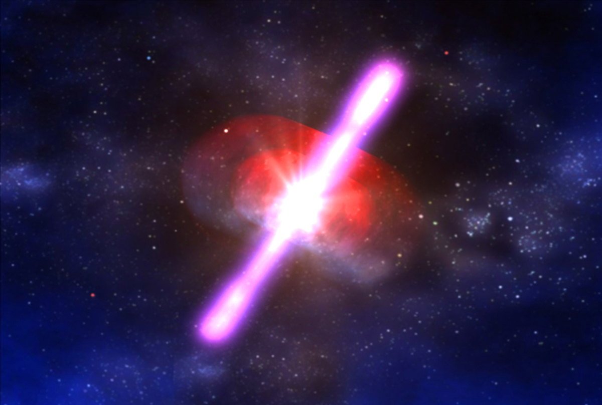 гама спалах